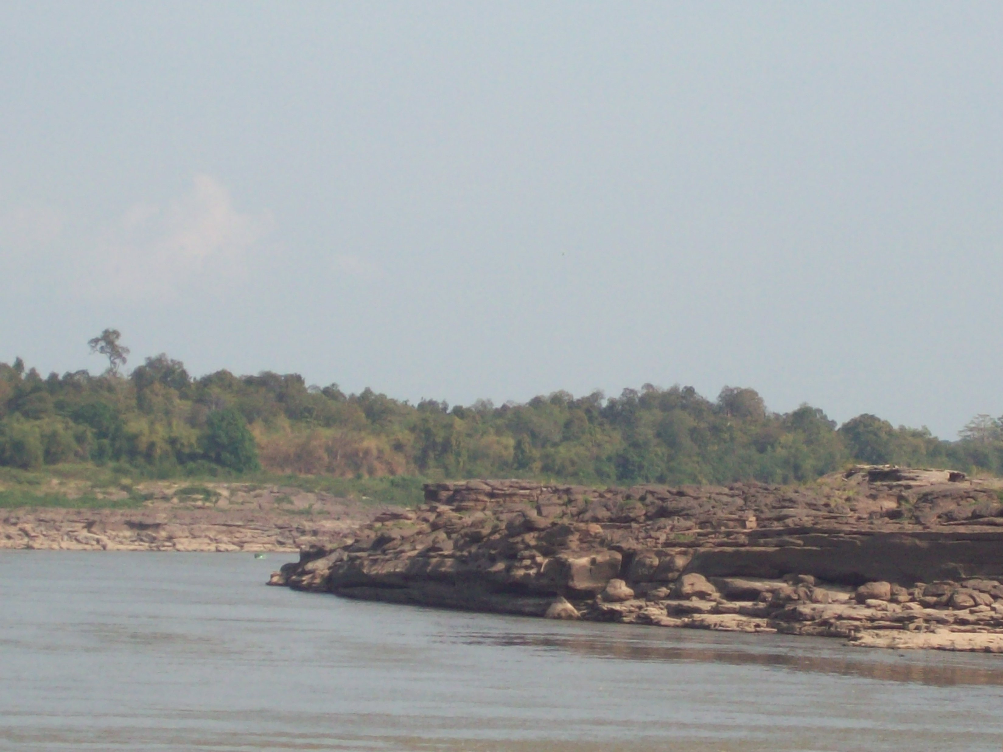 Sam phhan bok con río mekong.